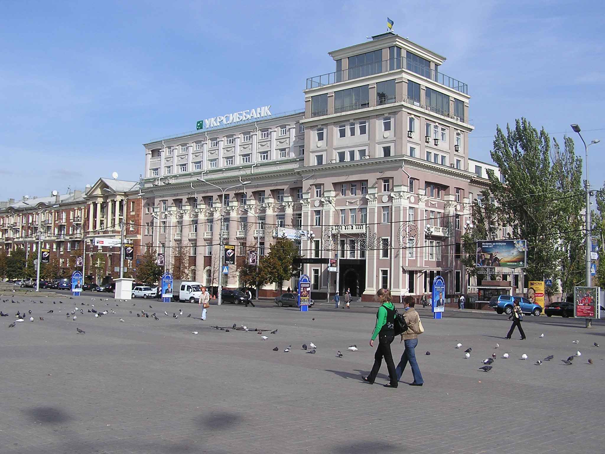 Площадь Ленина в Донецке